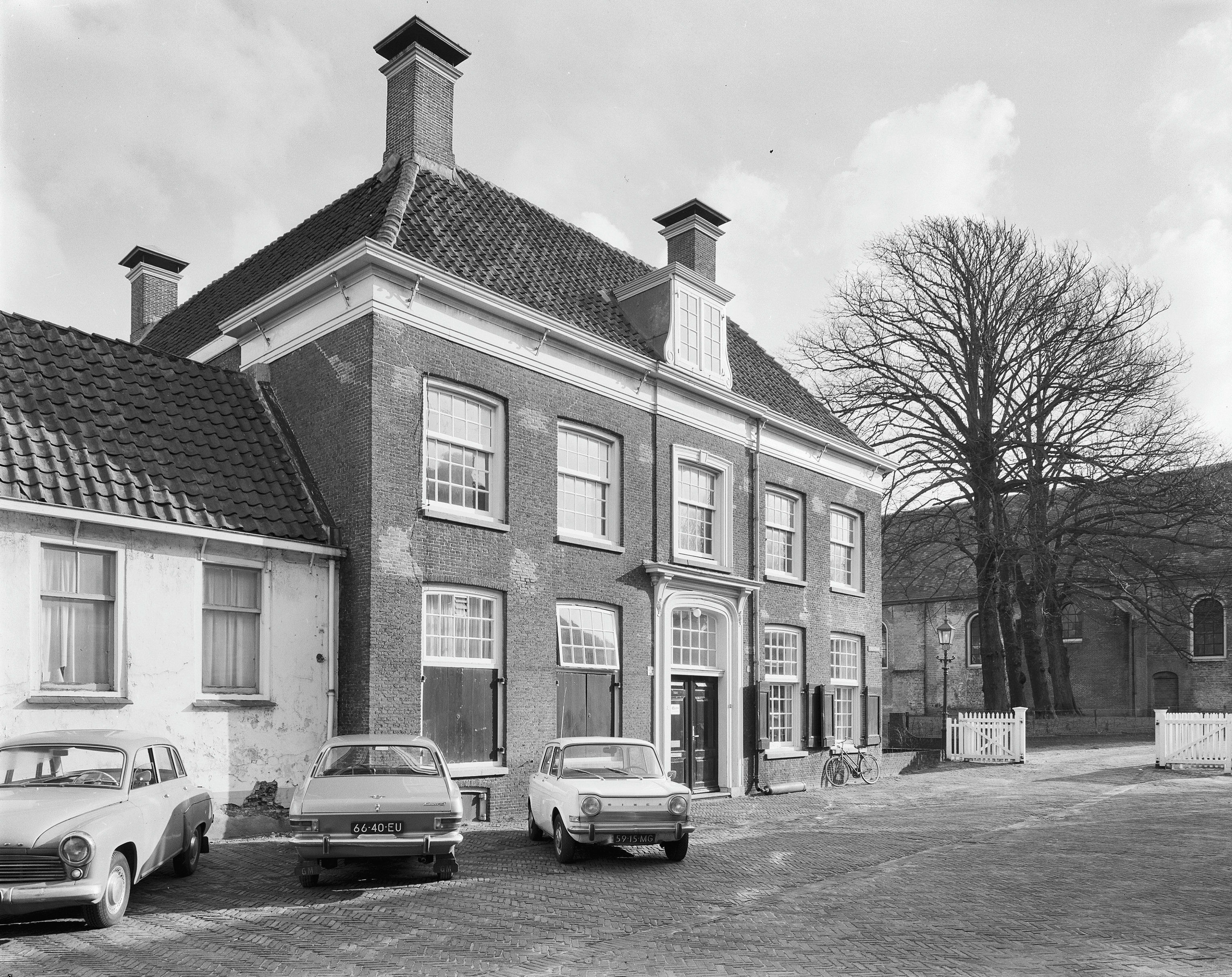 aanzicht